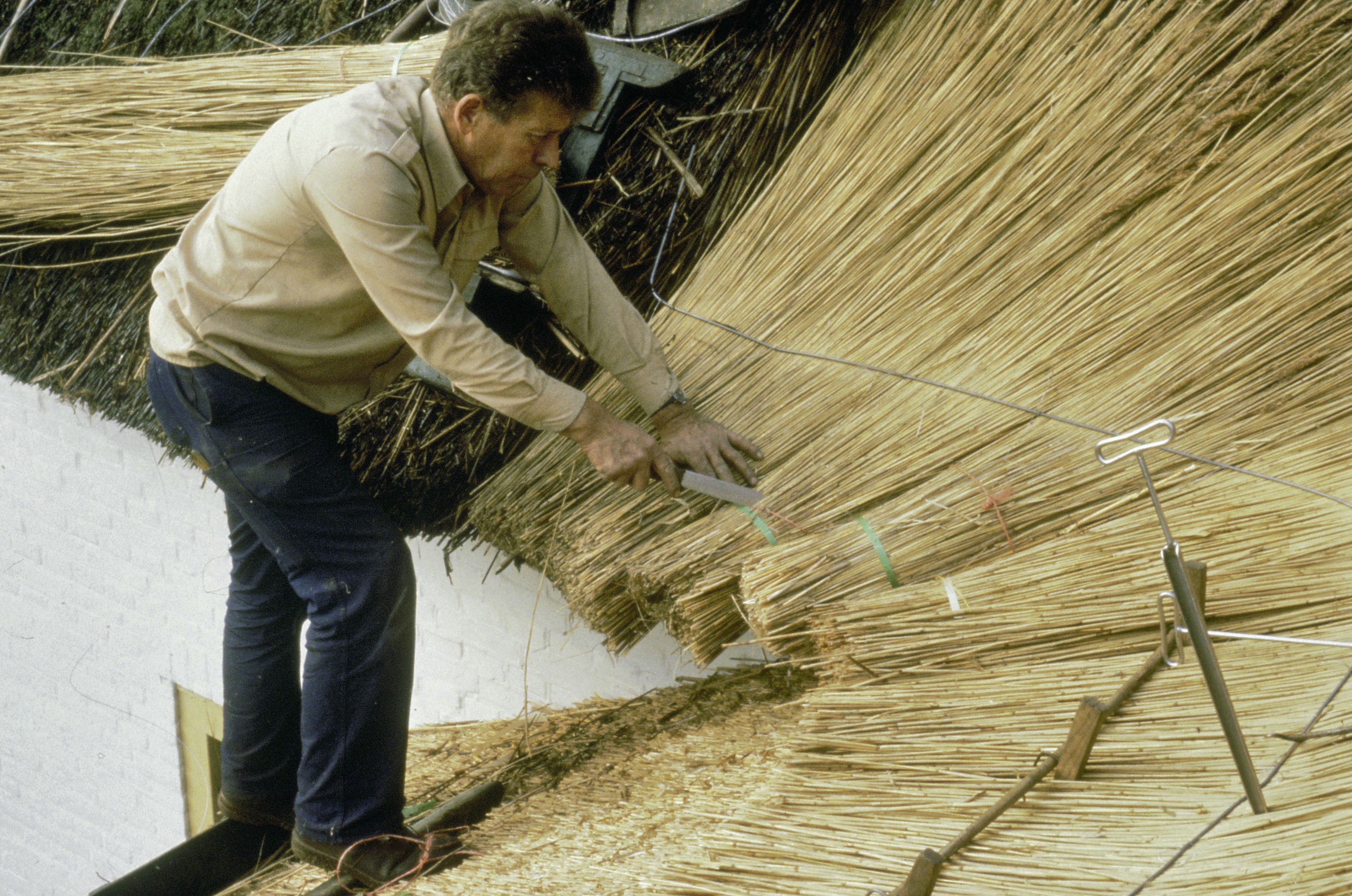 Riet/ Rieten dak: Rietdekker aan het werk (opmerking: Diaklankbeeld "Het Rieten Dak" (nr.: B 35) vergelijk met 333.026)